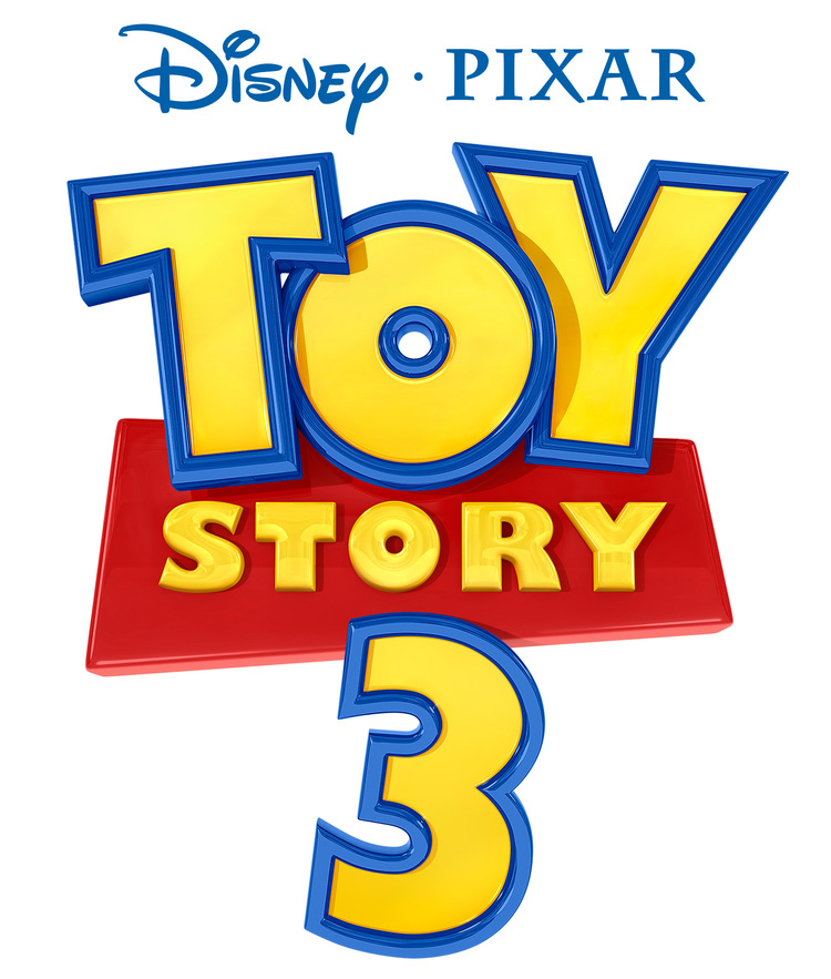 Toy Story 3 Logo